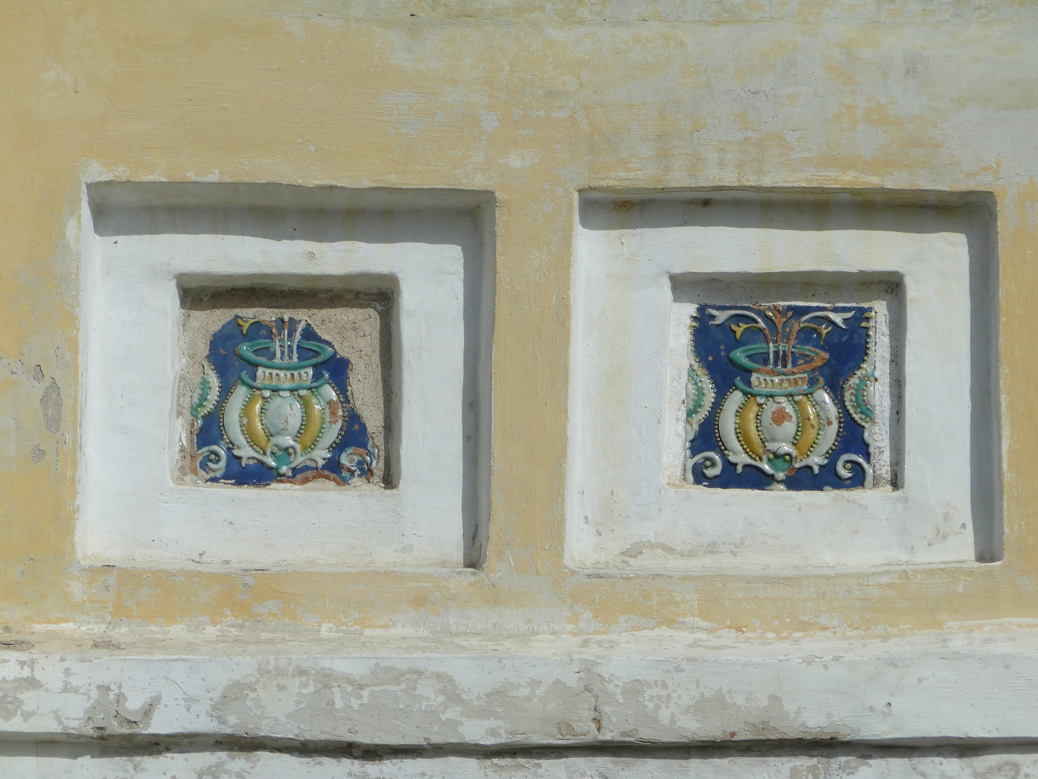 Изразцы на крыльце Церкви Рождества Иоанна Предтечи (Углич, Россия)